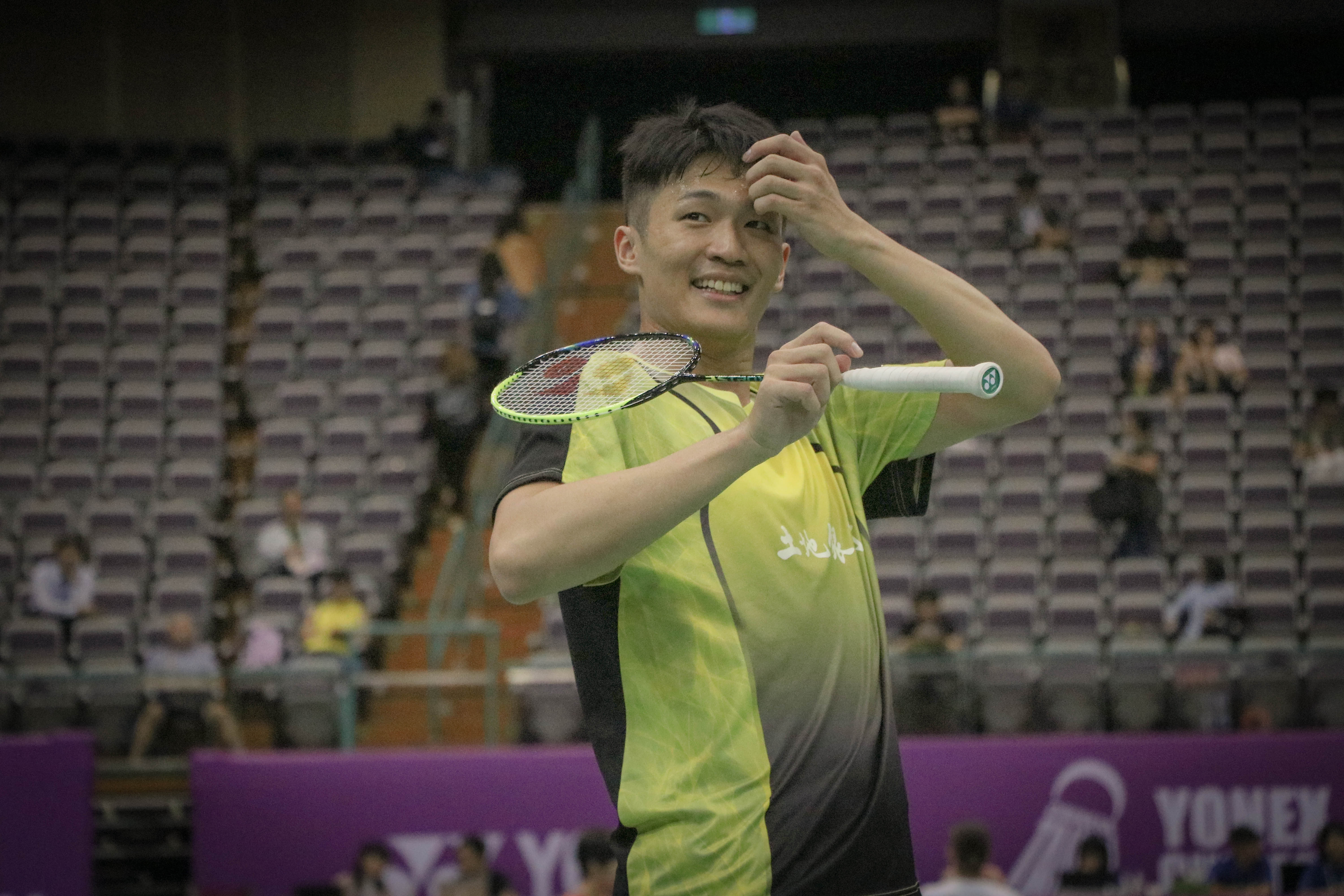 2018 台北OPEN 10/03